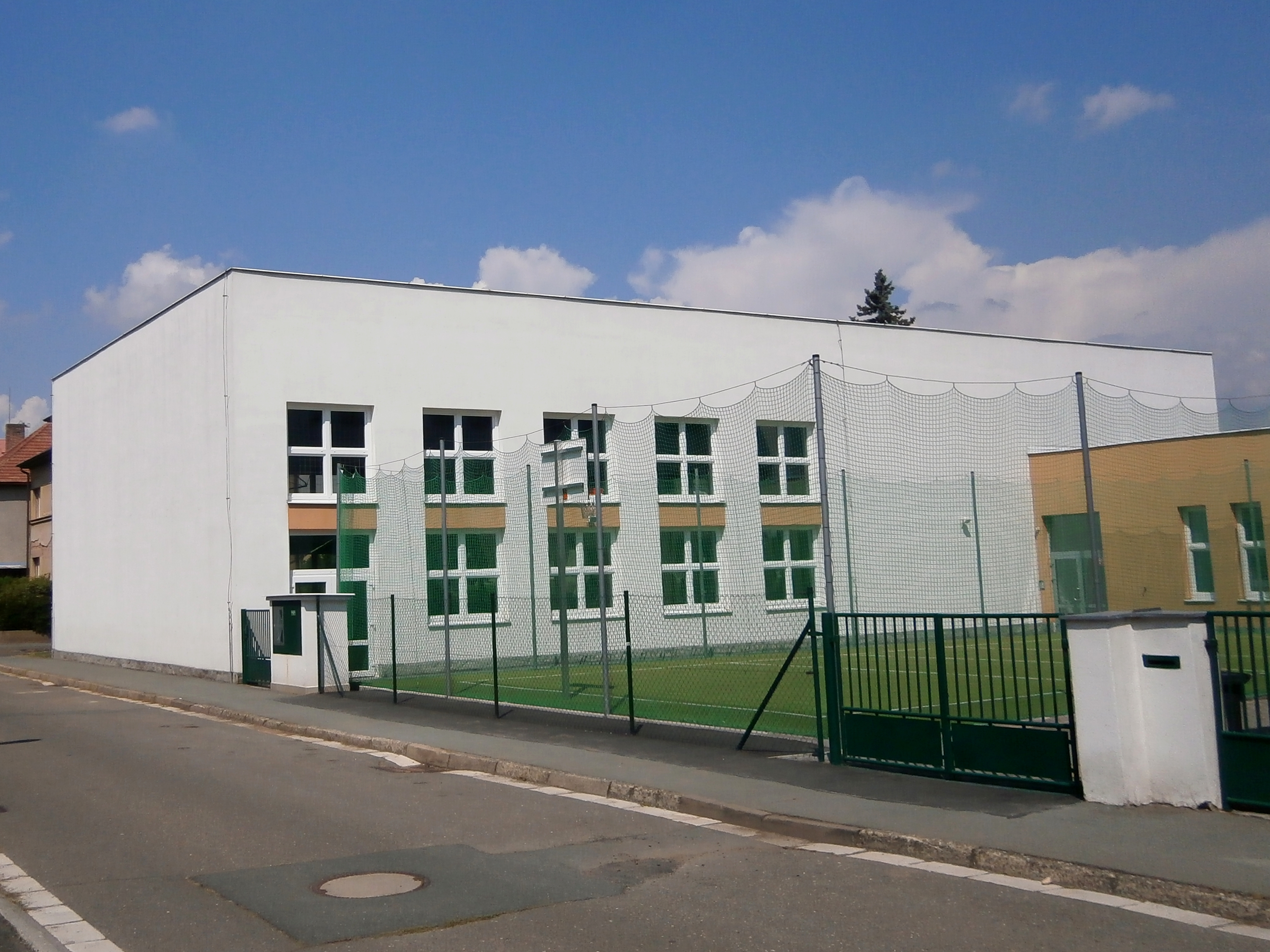 ZŠ Jiráskovo náměstí (Hradec Králové)